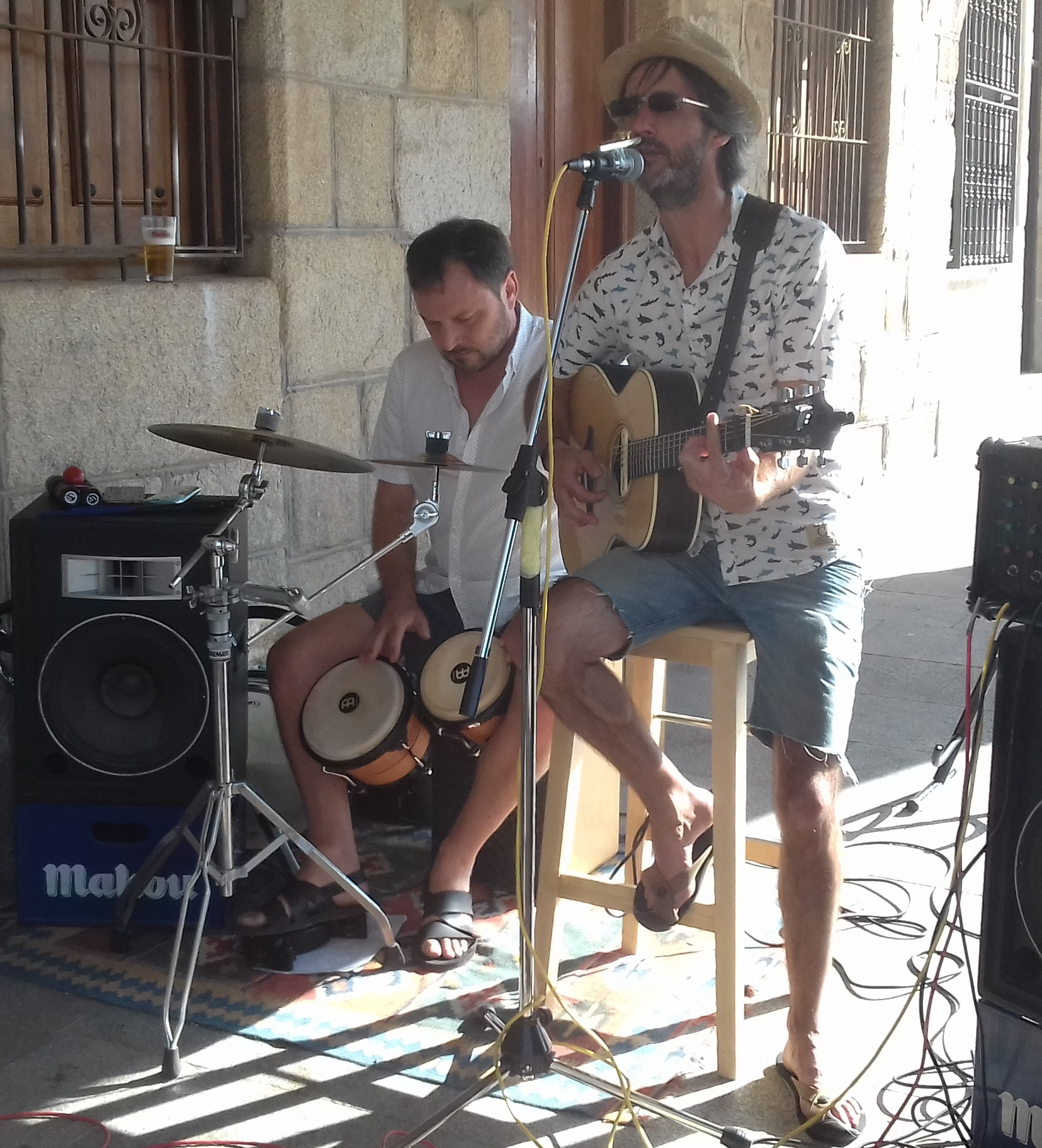 Roger de flor en concerto no Campiño de Santa María de Pontevedra